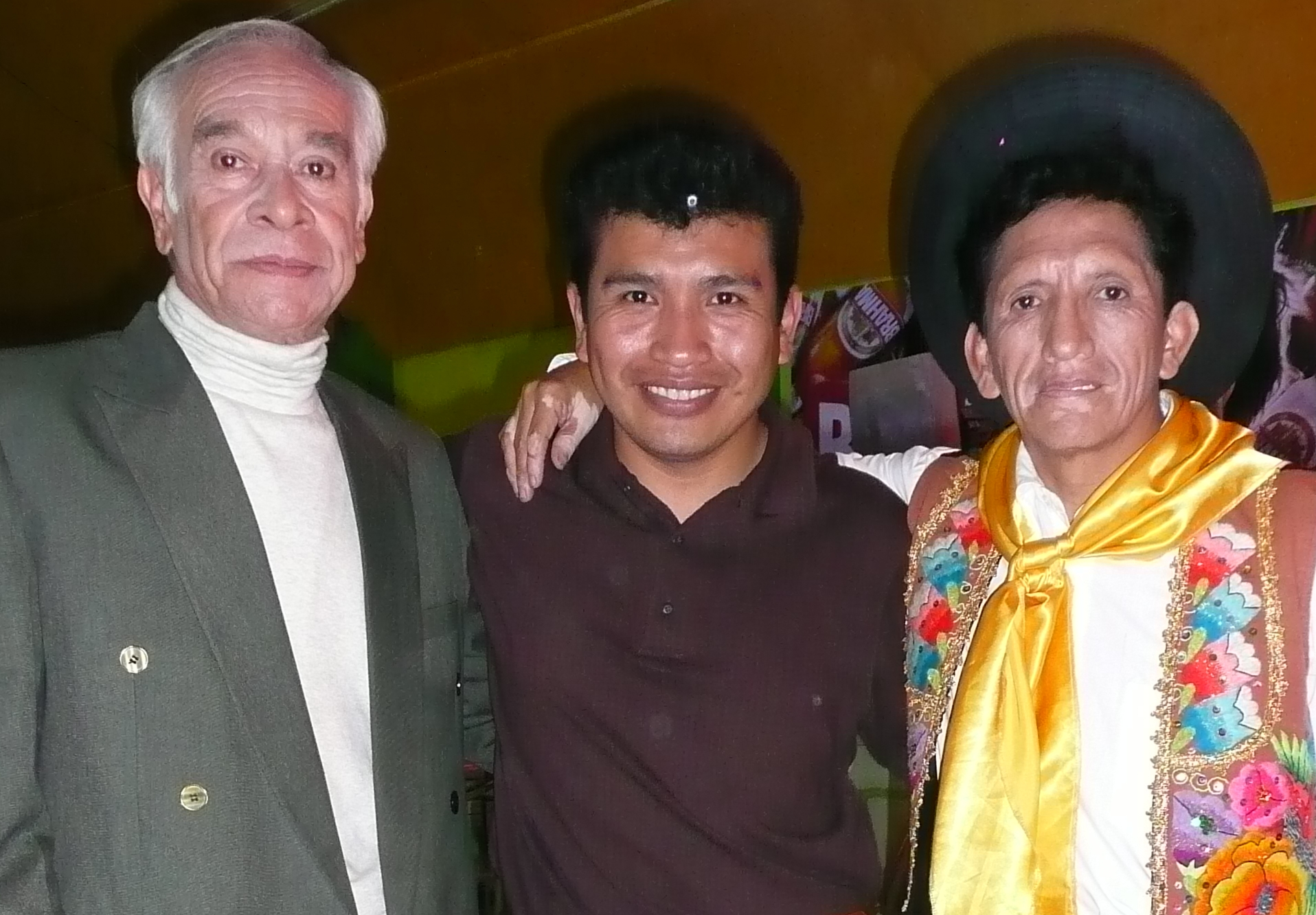 Eduardo Cesti (Cervera), Freddy Montesa (Cecilio) y Eusebio "Chato" Grados (como el mismo) en un descanso en la grabacion de la miniserie peruana "Sally, la muñequita del pueblo"